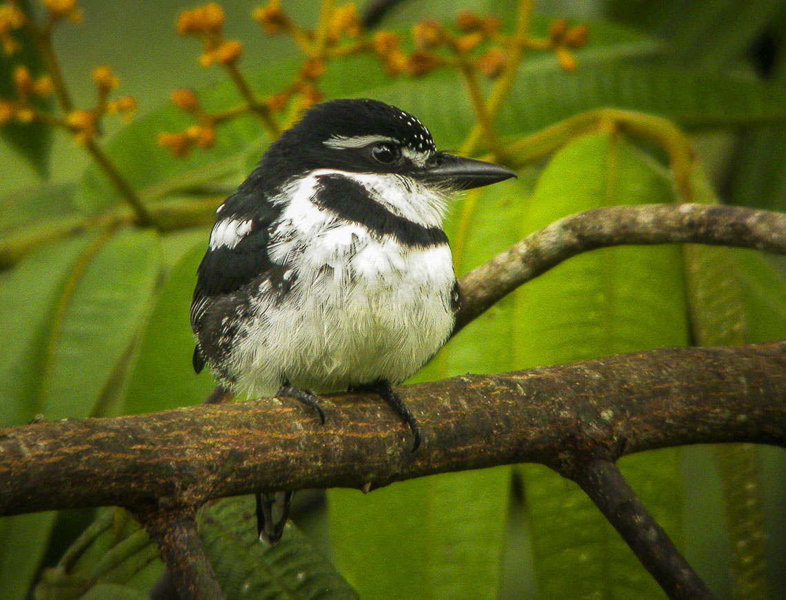 Pied Puffbird - Ecuador 05 dgs1